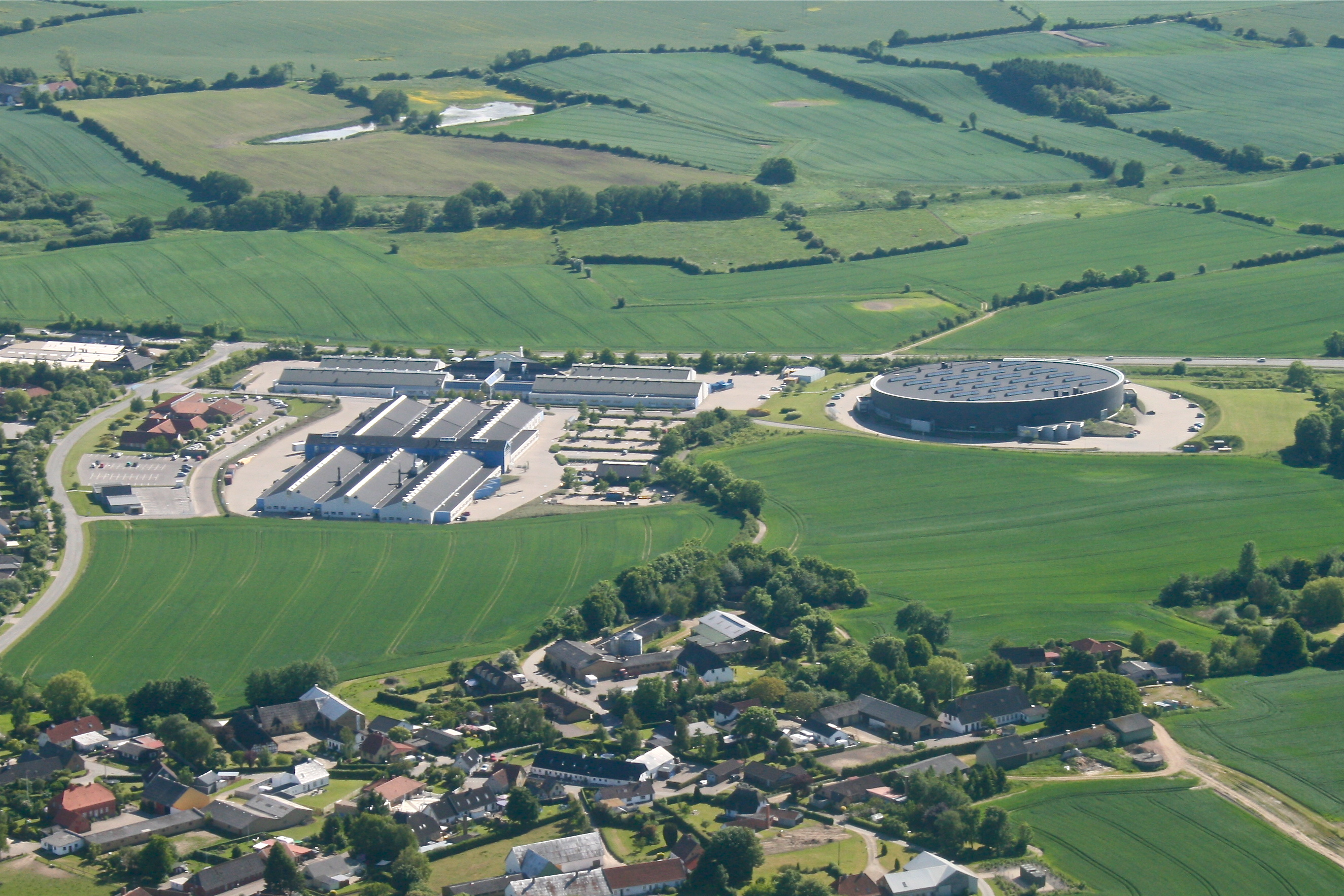 Linak's hovedkontor ved Guderup på Als.